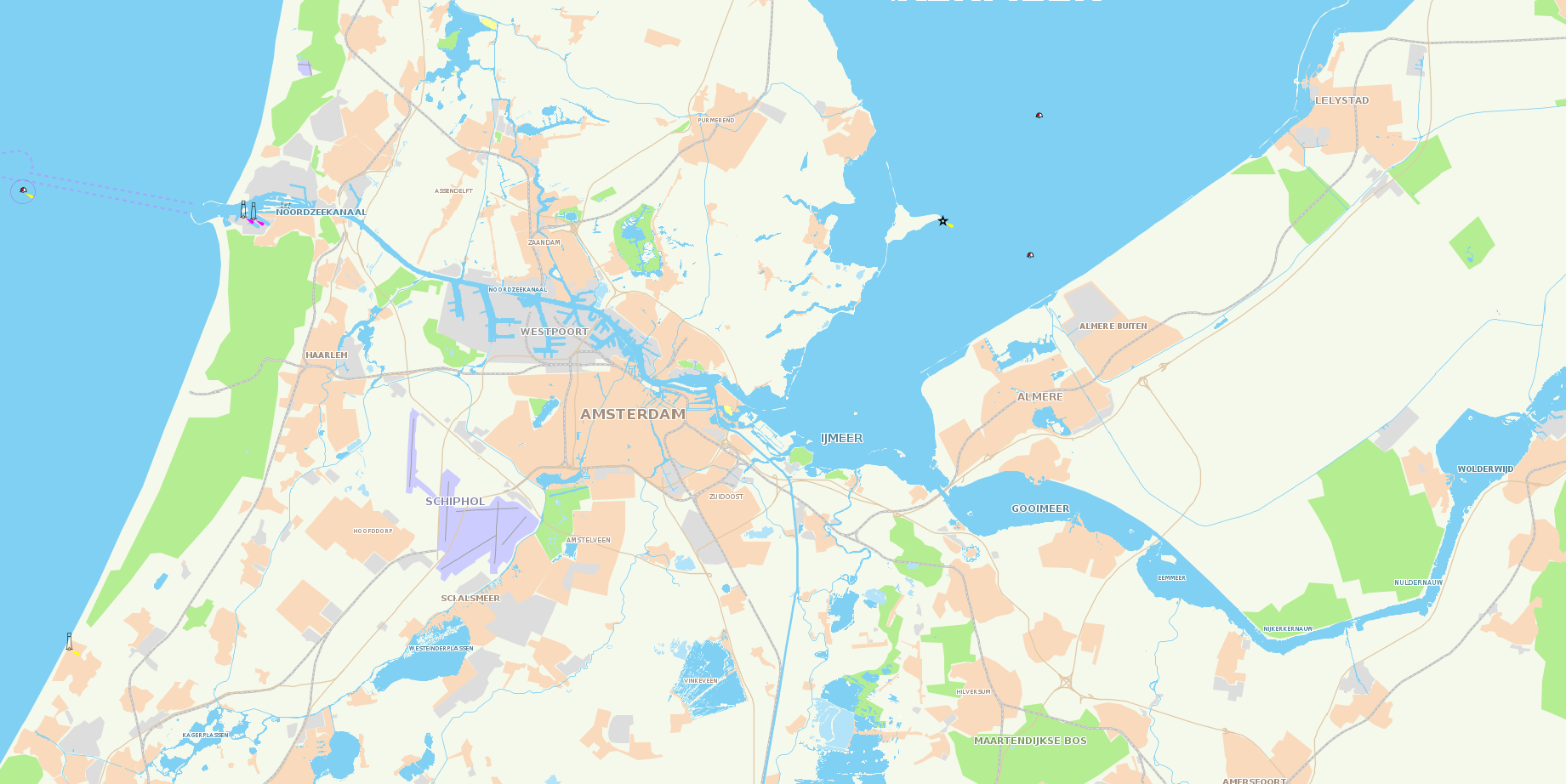 Voorbeeld van een topografische waterkaart met vlakken, lijnen en labels.